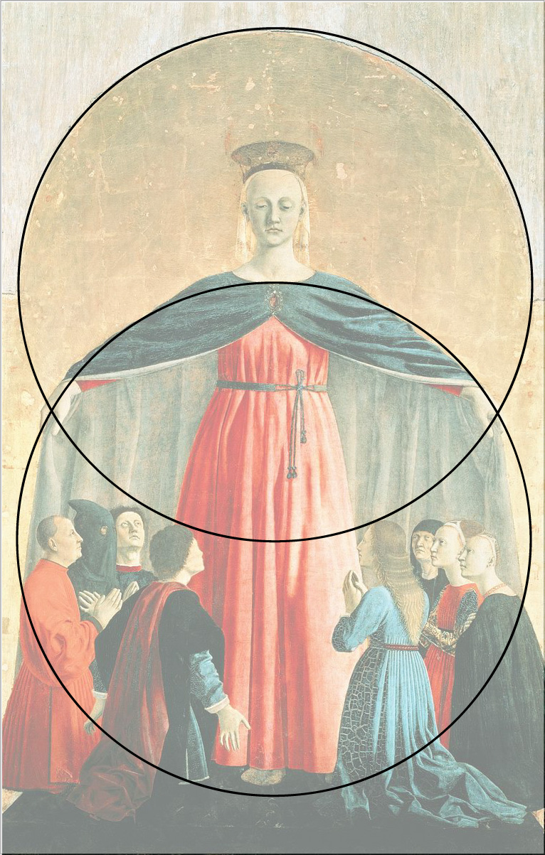 Lignes de forces dans le tableau